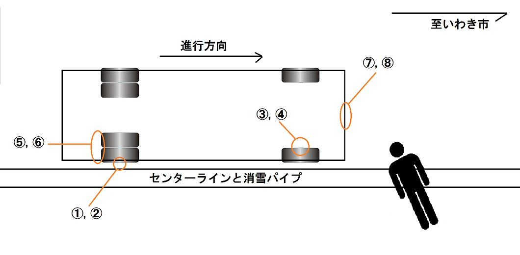 遠藤事件におけるトラック付着物と死体の位置 （File:Aiga toiletsq men.svgを使用）